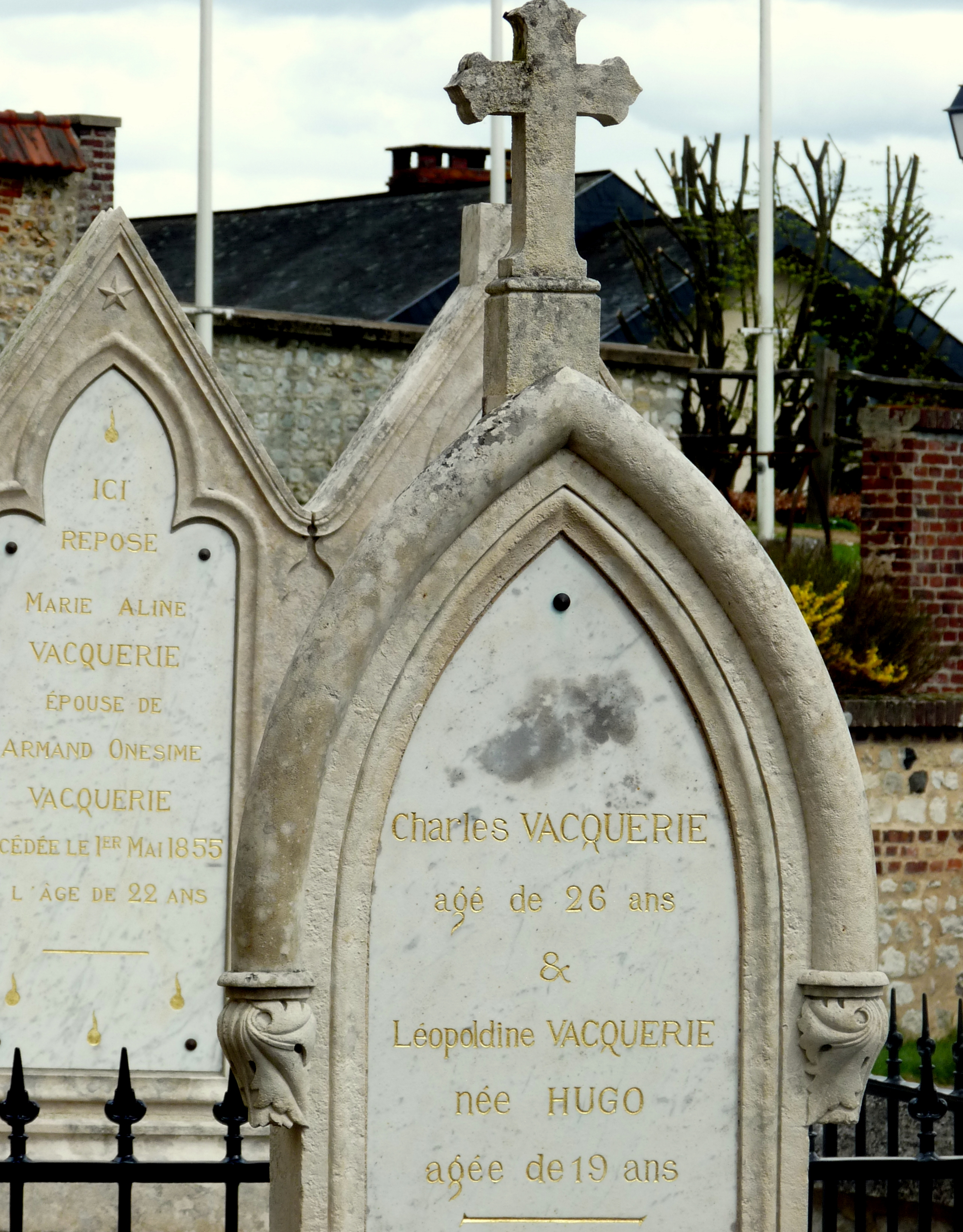 Sépultures de la famille Vacquerie-Hugo